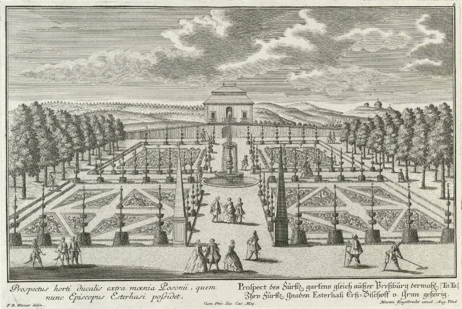 Wird als "Preßburger Garten" (Posoni kert) der vom Erzbischof von Gran Georg Lippay angelegt wurde, in der Literatur erwähnt.